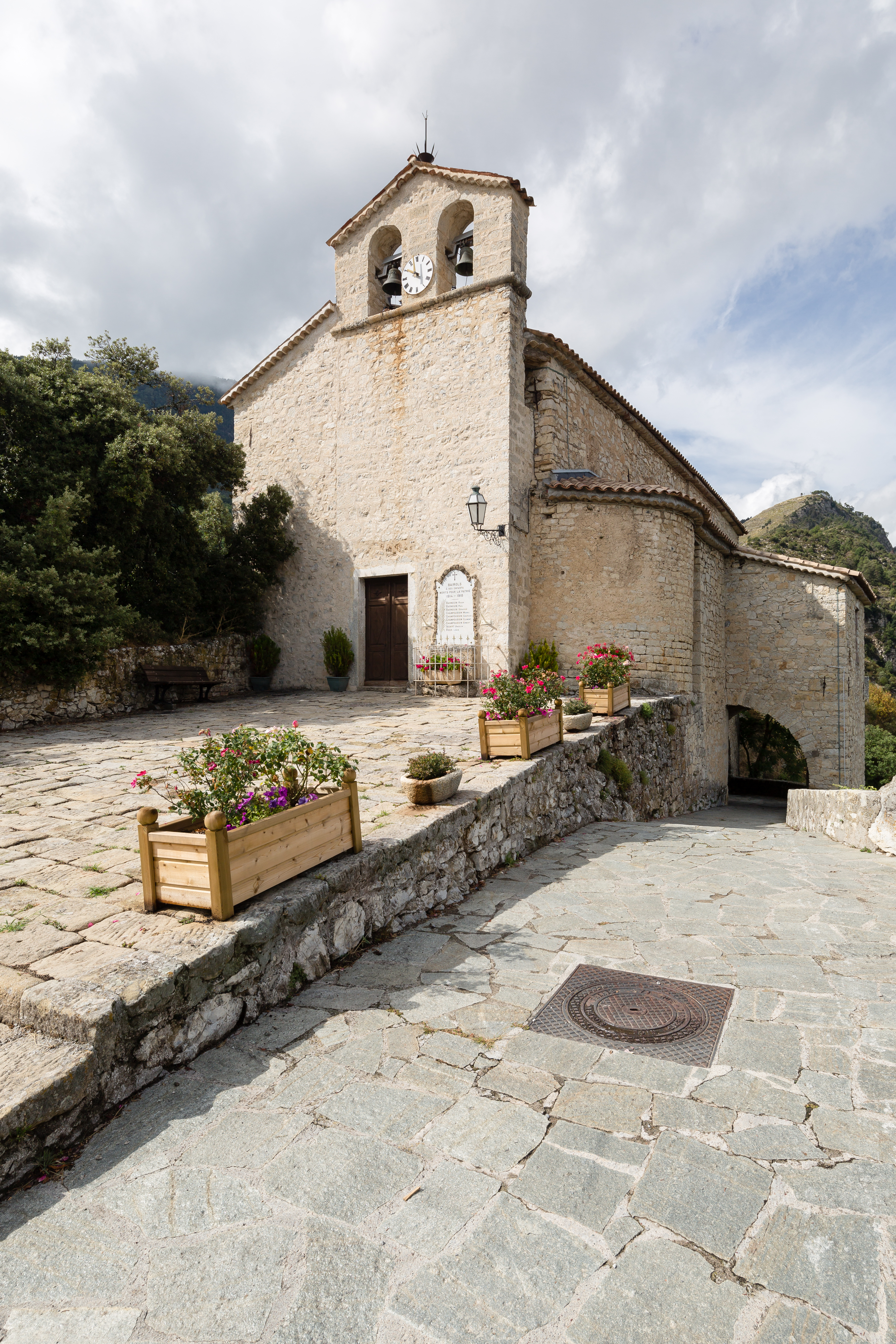 Façade de l'église Sainte-Marguerite de Bairols (France).